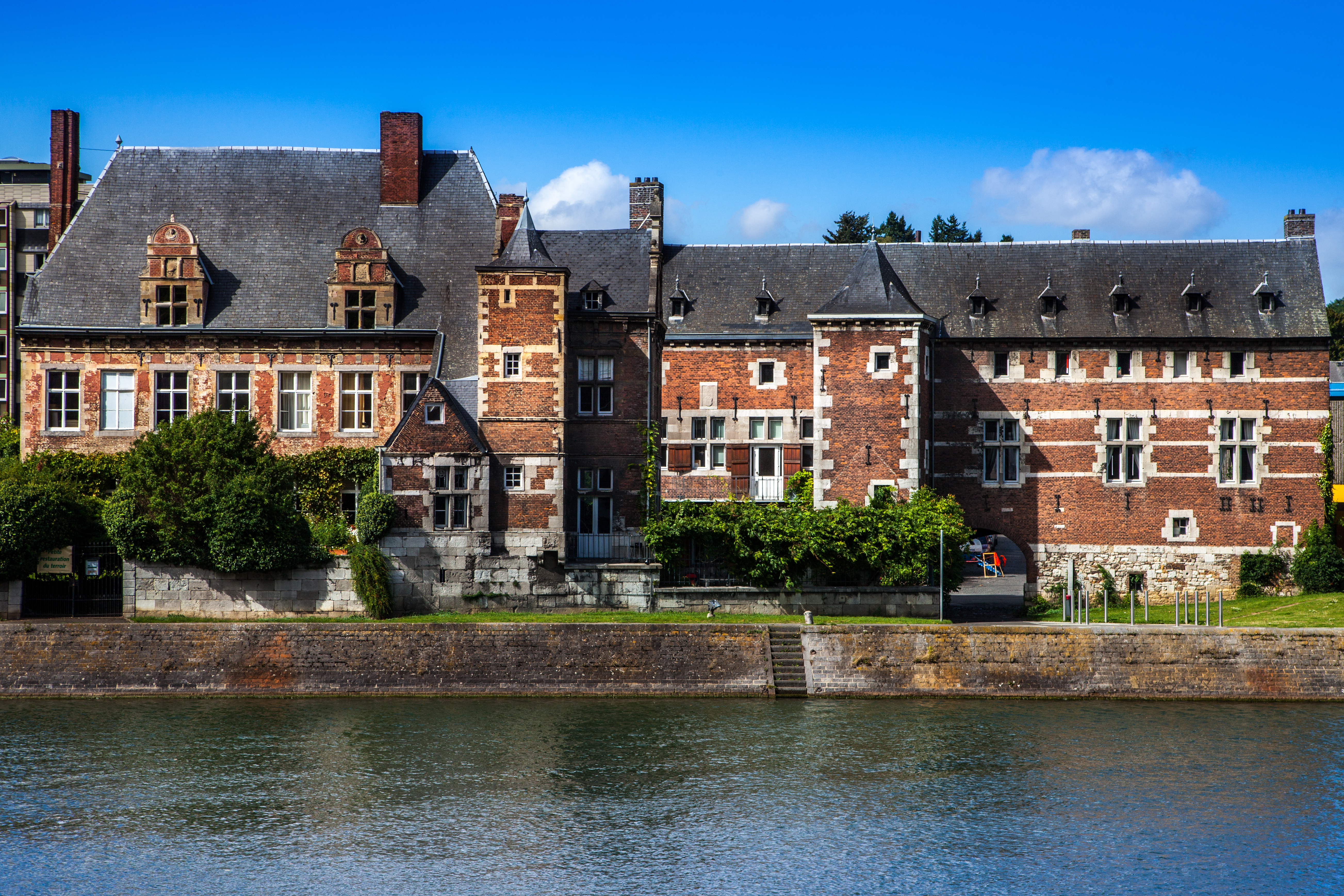 61031-CLT-0019-01